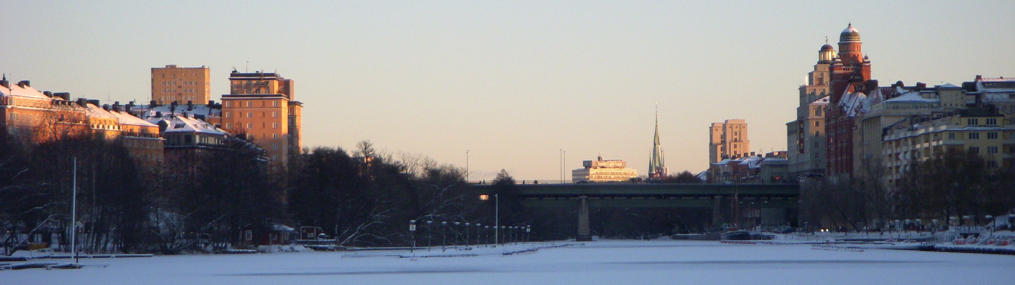 Karbergssjön och Sankt Eriksbron i Stockholm